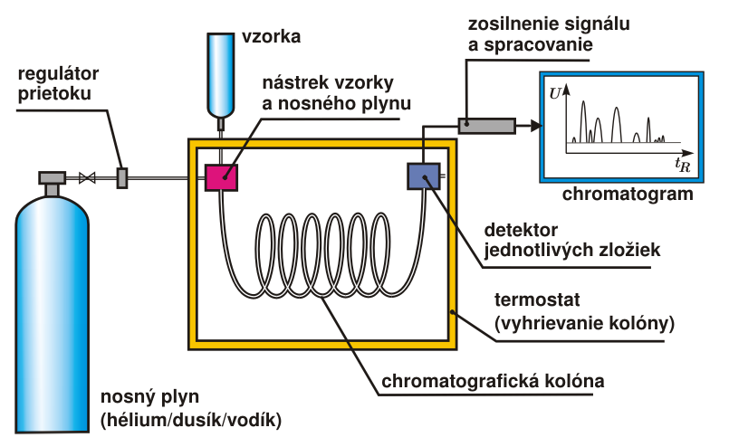 Schéma plynového chromatografu